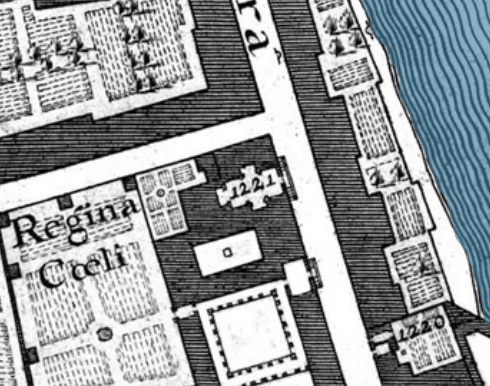 Pianta di Nolli